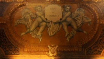 Représentation du code de commerce dans la grande salle d'audiance